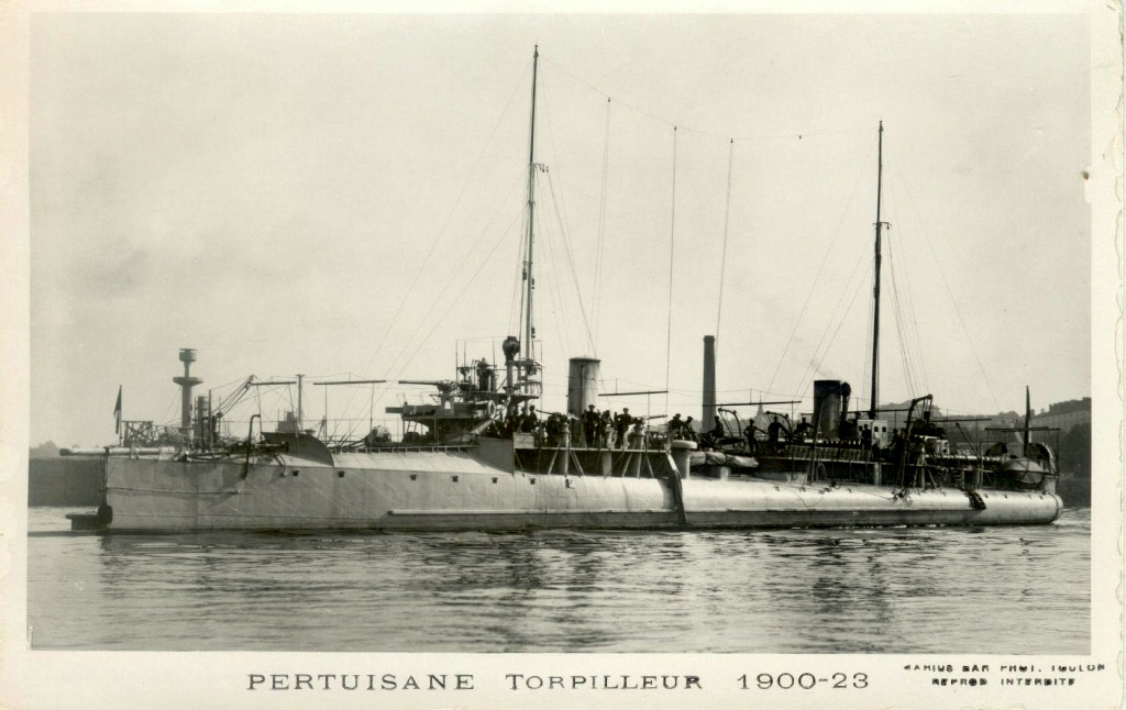 Contre-torpilleur : Pertuisane